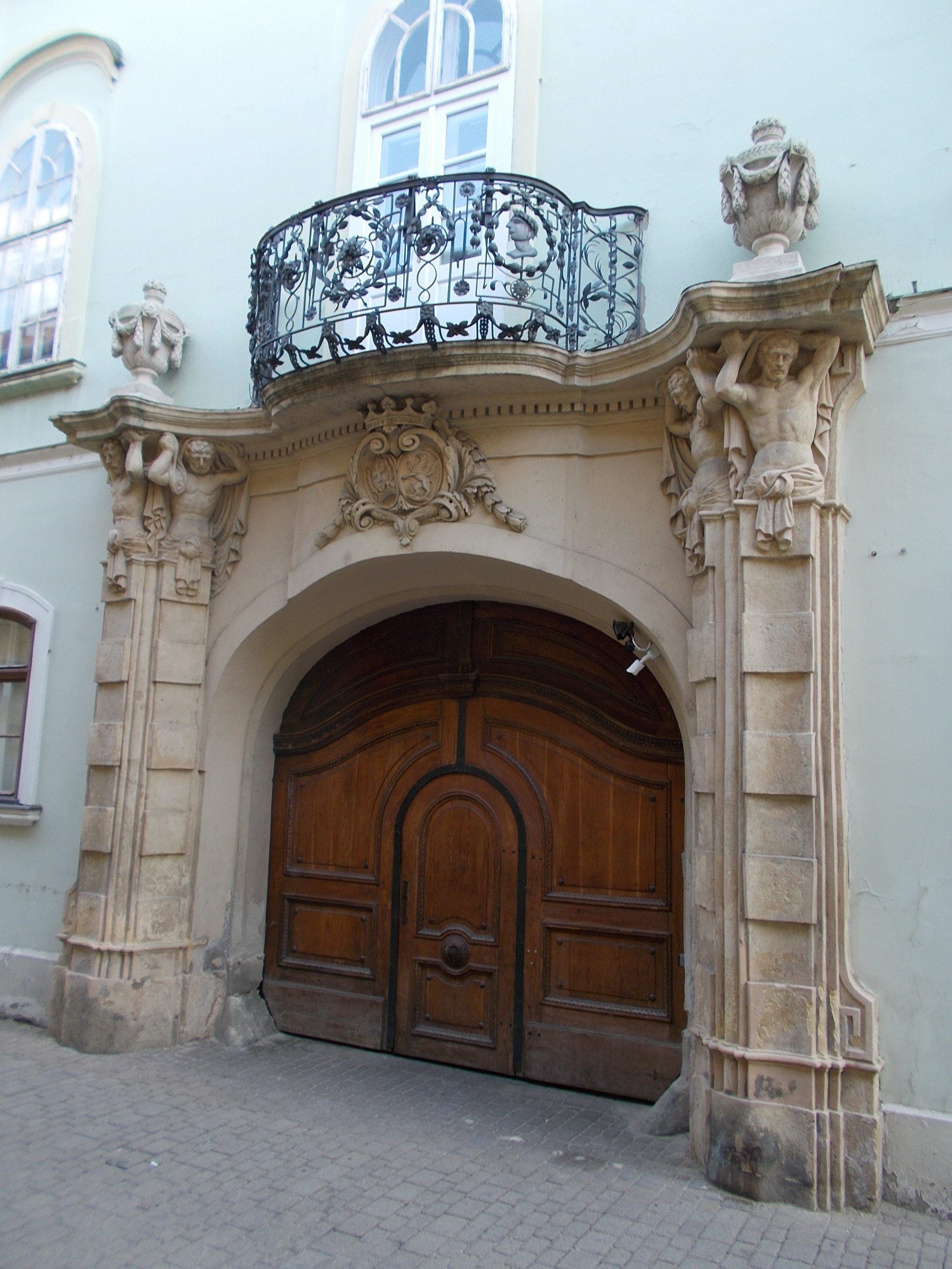 egykori Zichy-palota Műemlék ID 3843. Kapu, a mészkő épületdísz atlaszok avagy az egykori Zichy-palota kocsibehajtós kapujának szobrai. 1781-A kapu felett kovácsoltvas korlátos erkély és a Zichy és Széchenyi család egyesített címere látható. - Magyarország, Fejér megye, Székesfehérvár, Belváros, Kossuth u. 1., Városház tér 1.. sarok This is a photo of a monument in Hungary, Identifier: 3843 Forrás